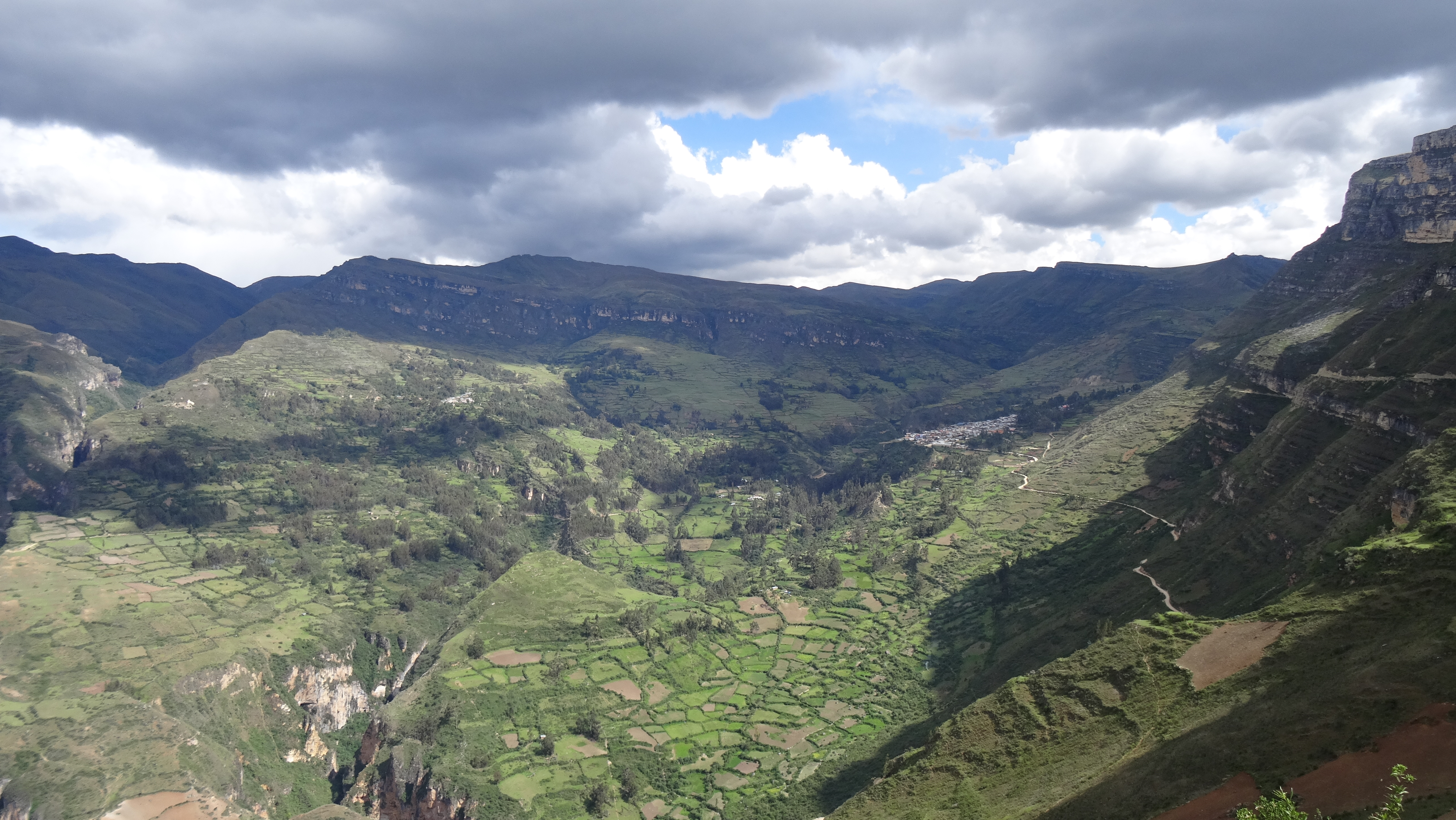 Parte del distrito de Huacachi dividido por la quebrada San Jeronimo, visto desde el norte en el lado noreste del cerro Misión Jirca.